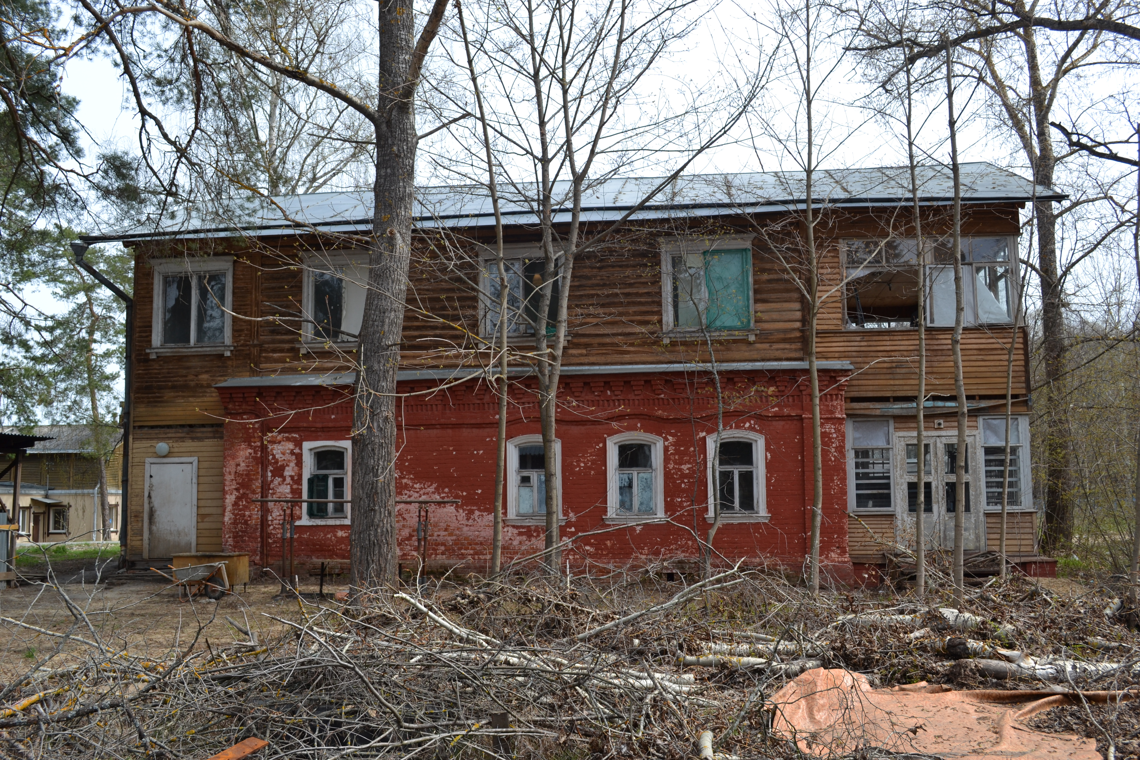 Монастырь Александро-Мариинский, дом игуменьи (Московская область, Шатурский район, деревня Евлево)